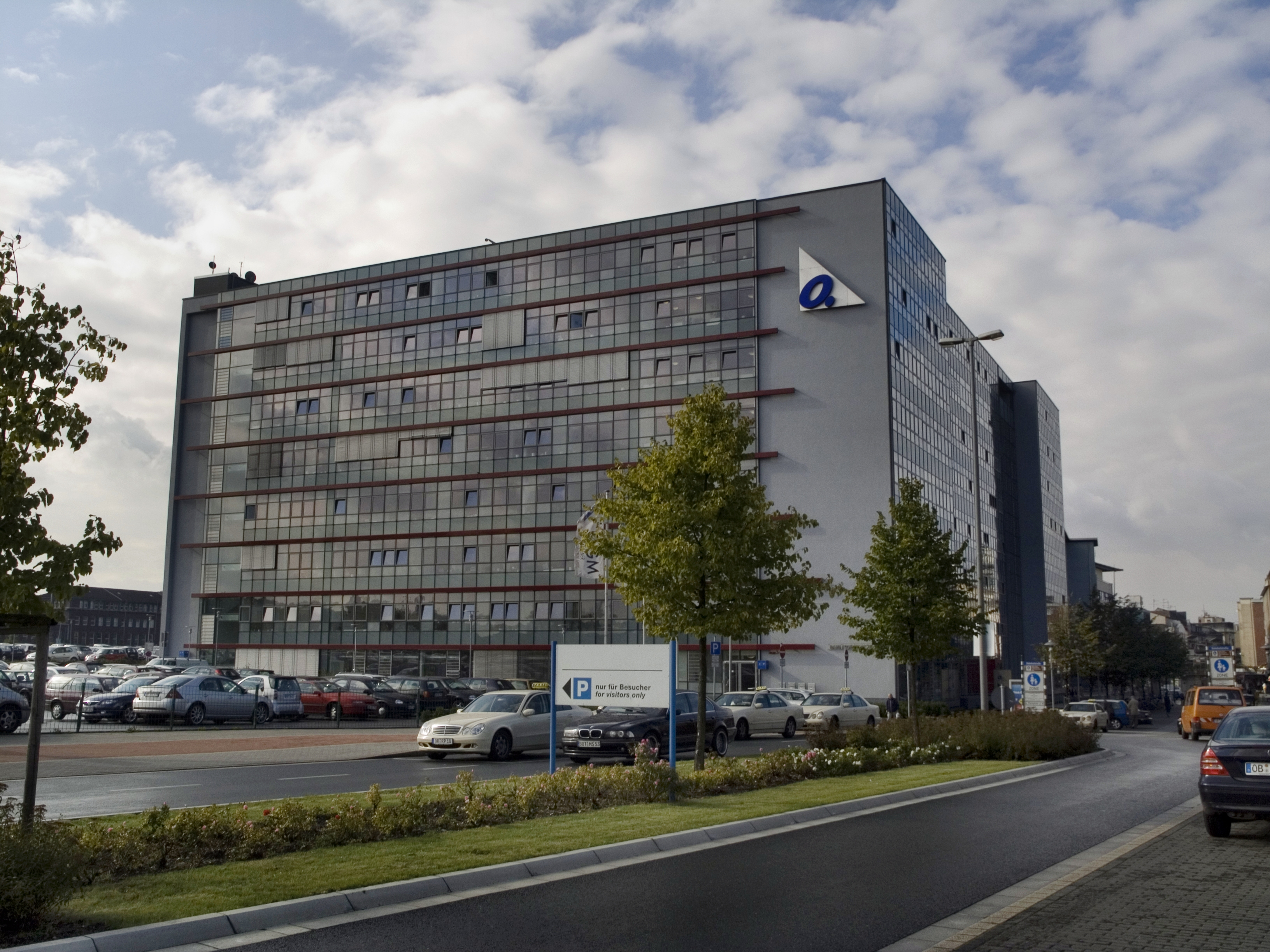 Северный Рейн - Вестфалия, Оберхаузен. Техническая ратуша в Штеркраде